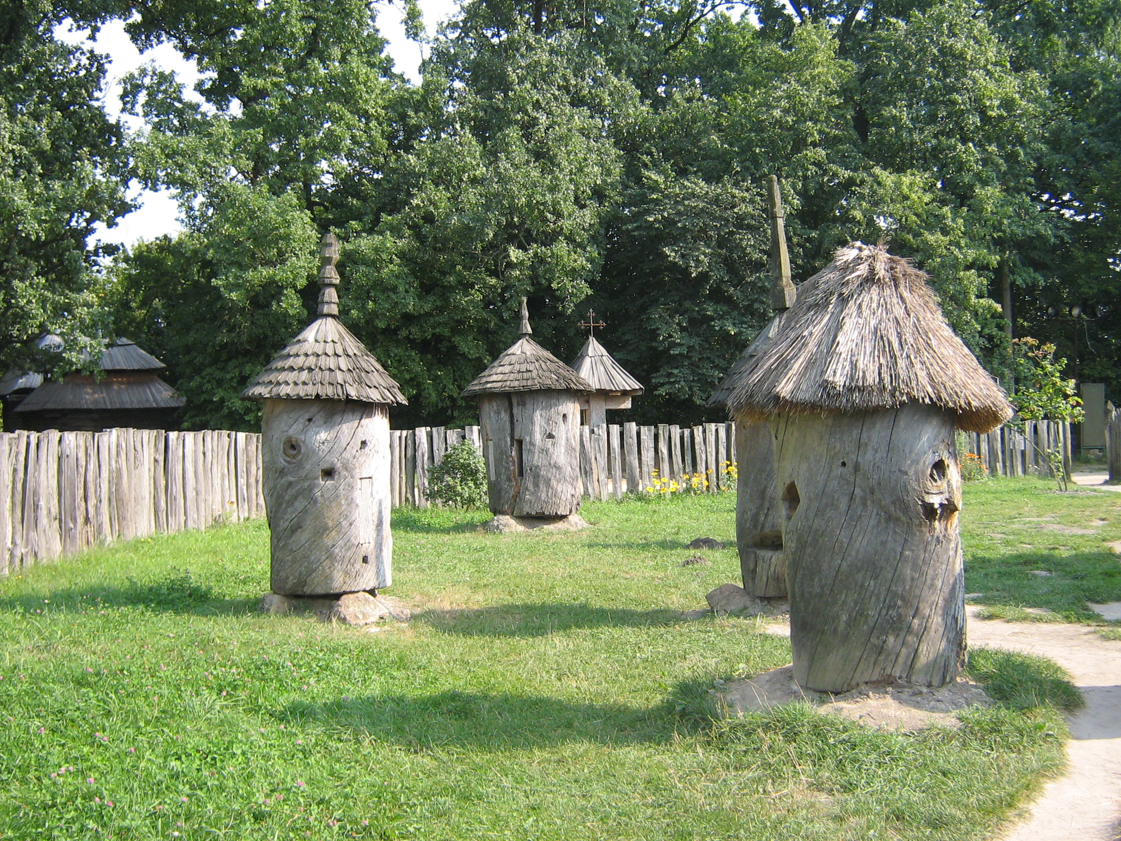 Експозиція пасіки в Національному музеї народної архітектури та побуту України.